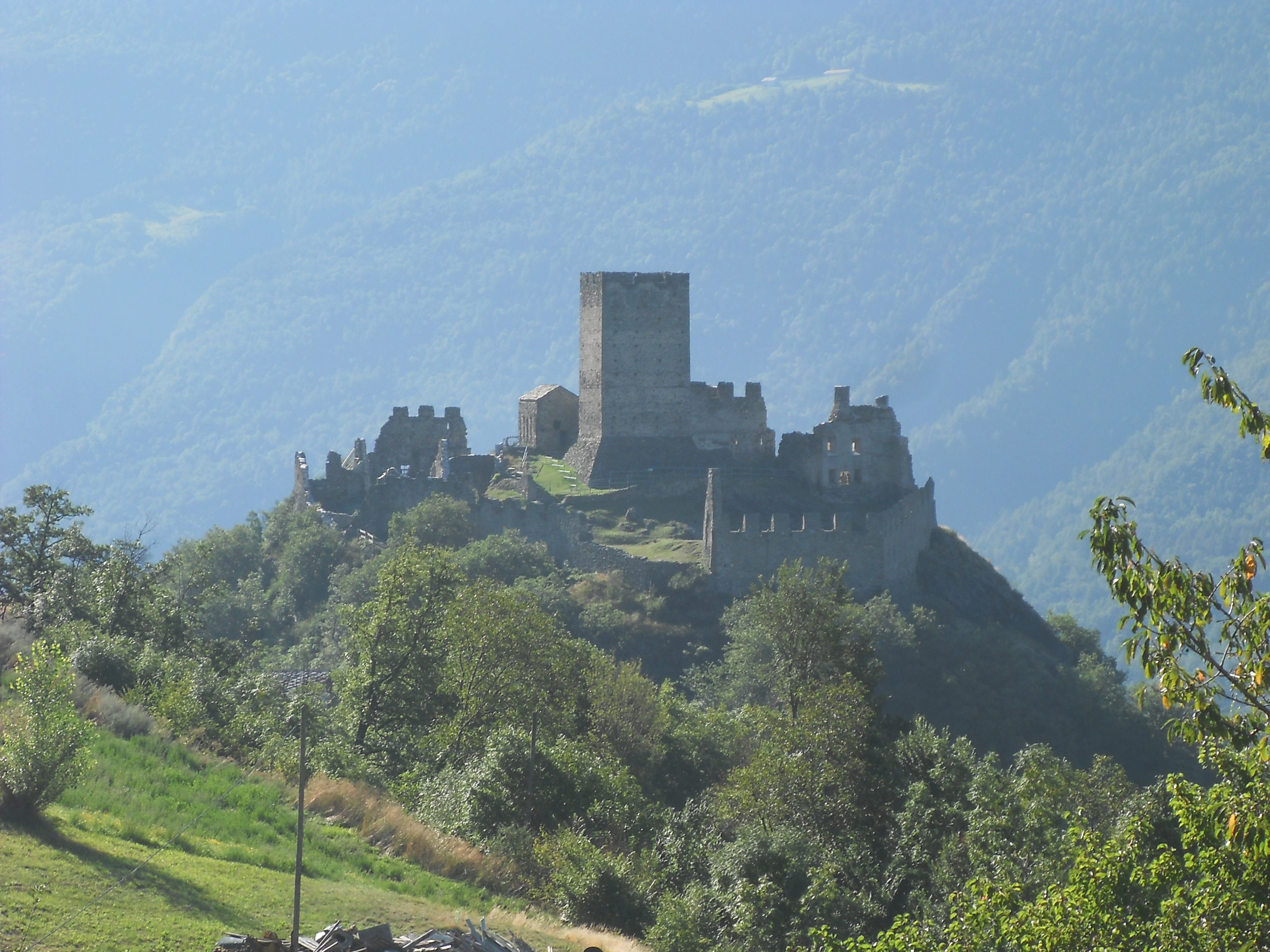 Castello di Cly, Saint-Denis, Valle d'Aosta, Italia This is a photo of a monument which is part of cultural heritage of Italy.